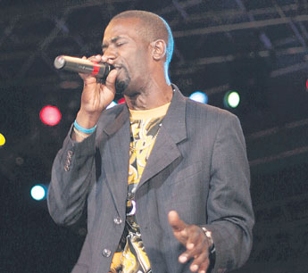 Nando Boom en concierto